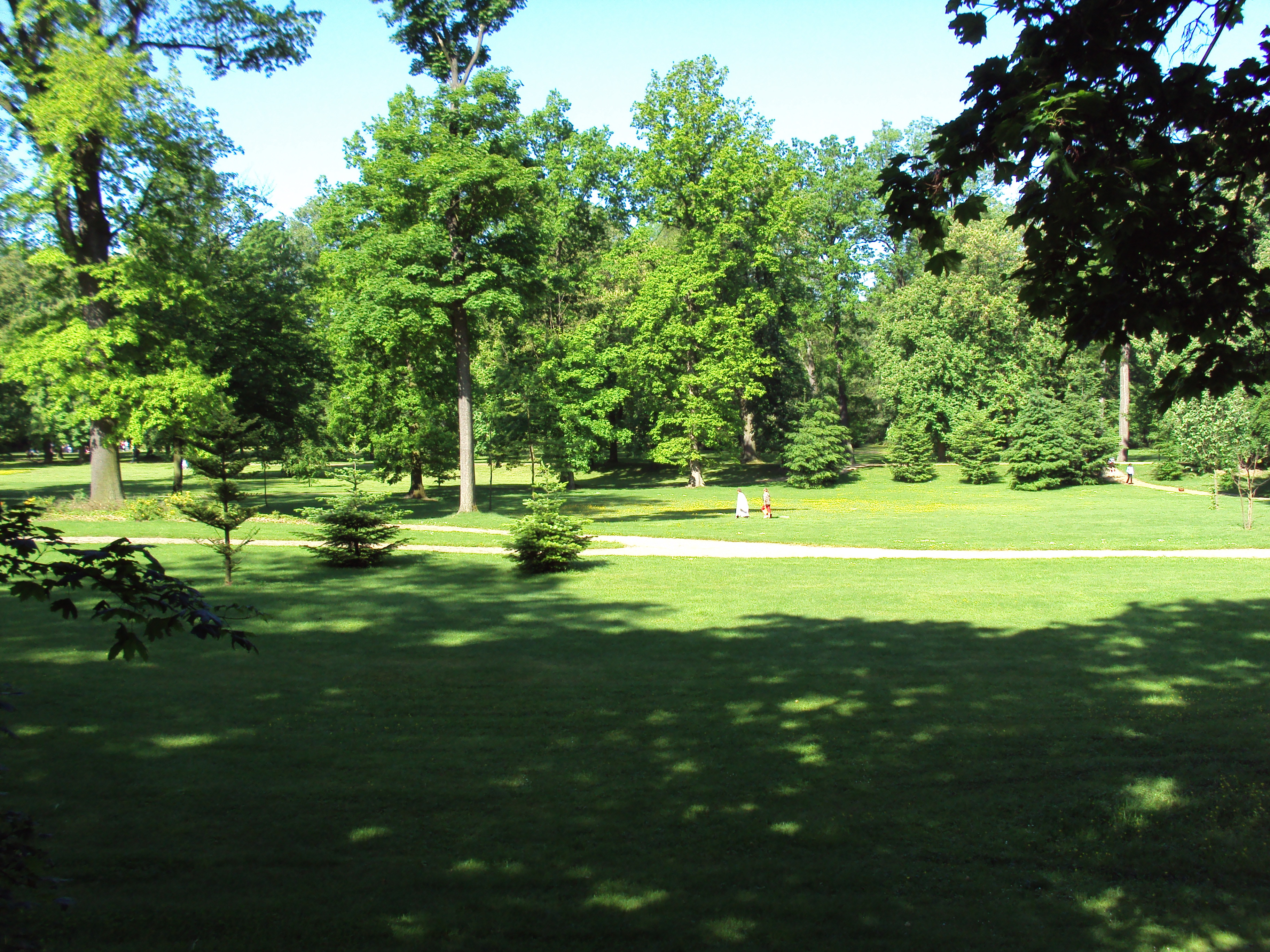 Anglický park u zámku v Zákupech